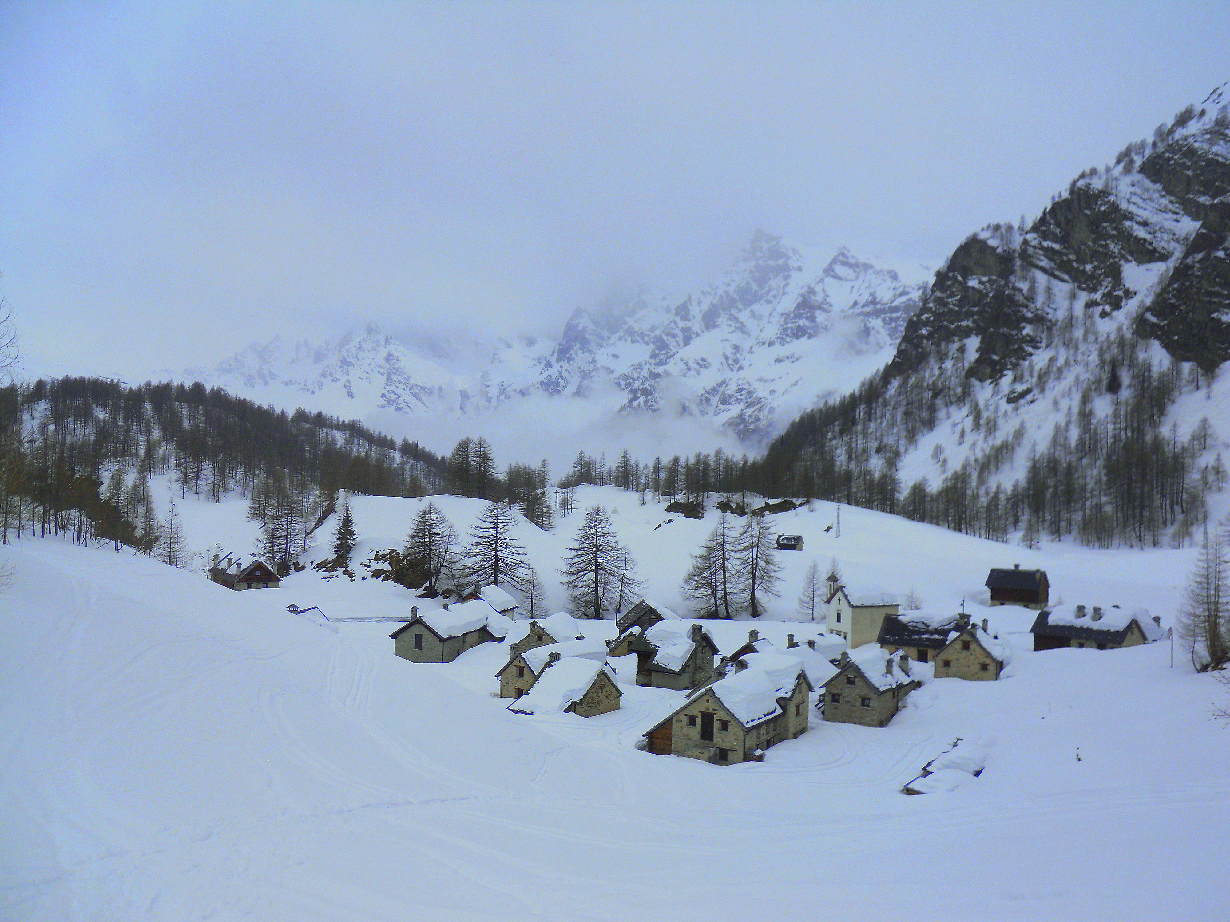 Crampiolo (Alpe Devero) sotto la neve